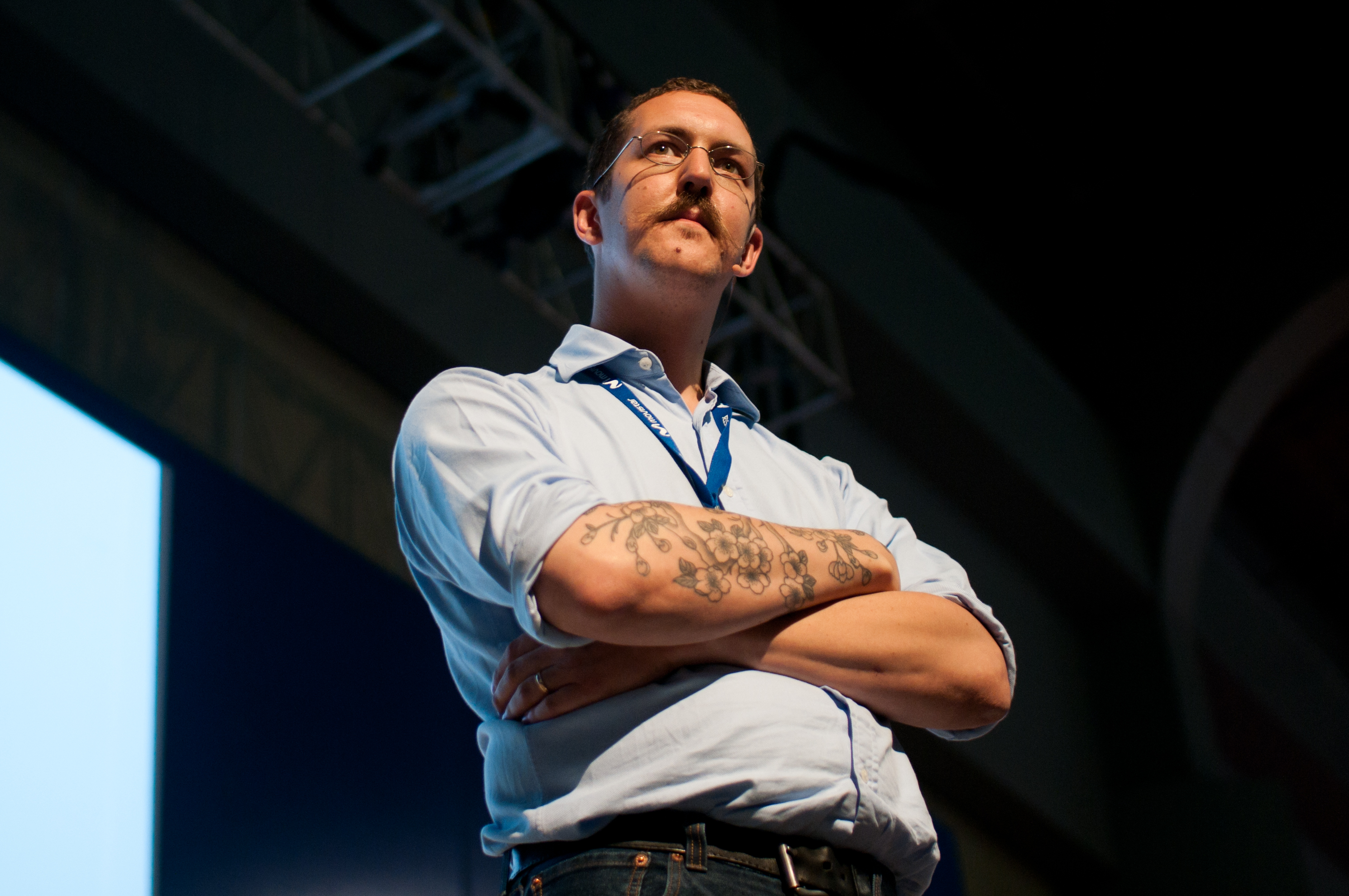 Editor de la revista Wired UK. Dió una de las mejores conferencias que he escuchado. Habló sobre la importancia de comprometerse con el desarrollo de las nuevas tecnologías. Resultó cautivante. Frase para recordar: "Don't mind about the people running the world right now. They're old. They'll be dead soon" Por cierto. Pueden ver la conferencia que dio aquí: En Inglés.